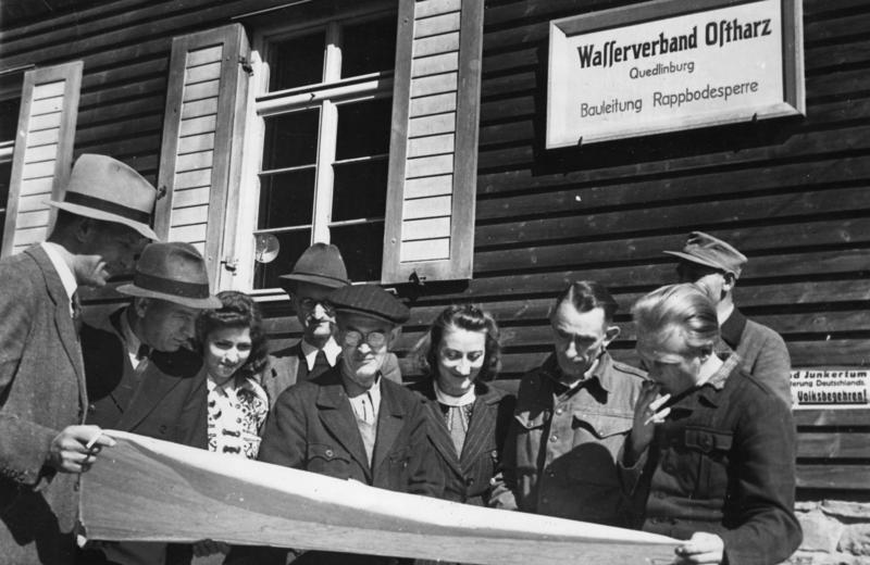 Harz, Bau der Bodetalsperre Sachsen-Anhalt 1948 Weiterbau der Bode-Talsperre - Das grösste Nachkriegsprojekt der Sowjet-Zone. Bild zeigt: den Baustab des Wasserverbandes Ostharz-Bauleitung Rappbode-Talsperre. Illus-Dumm 1587-48